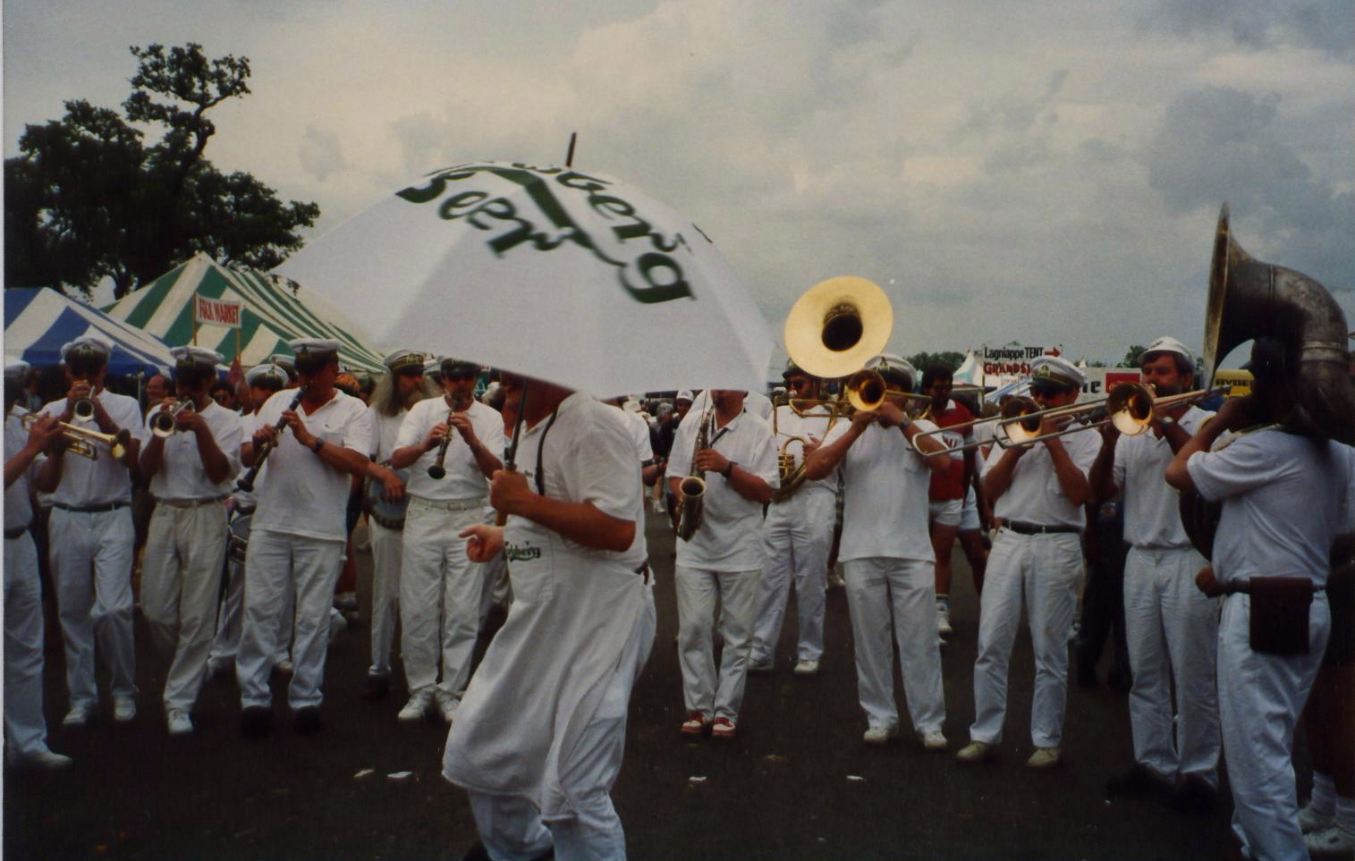 New Orleans Jazz Fest 1991. Carlsberg Brass Band